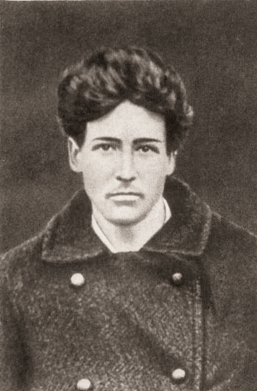 Nikolaj Alekseevič Želvakov